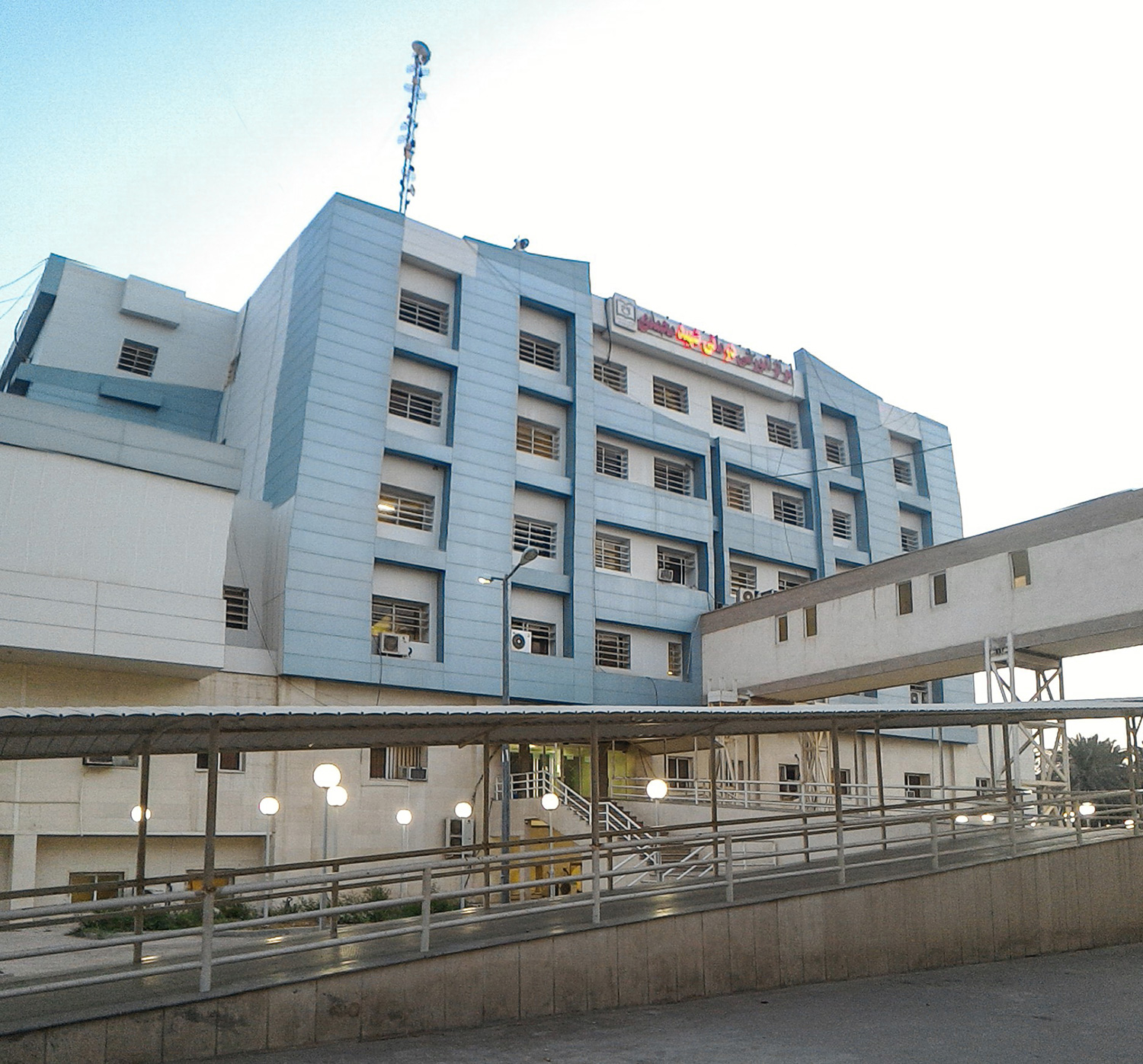 ساختمان اصلی بیمارستان شهید محمدی بندرعباس